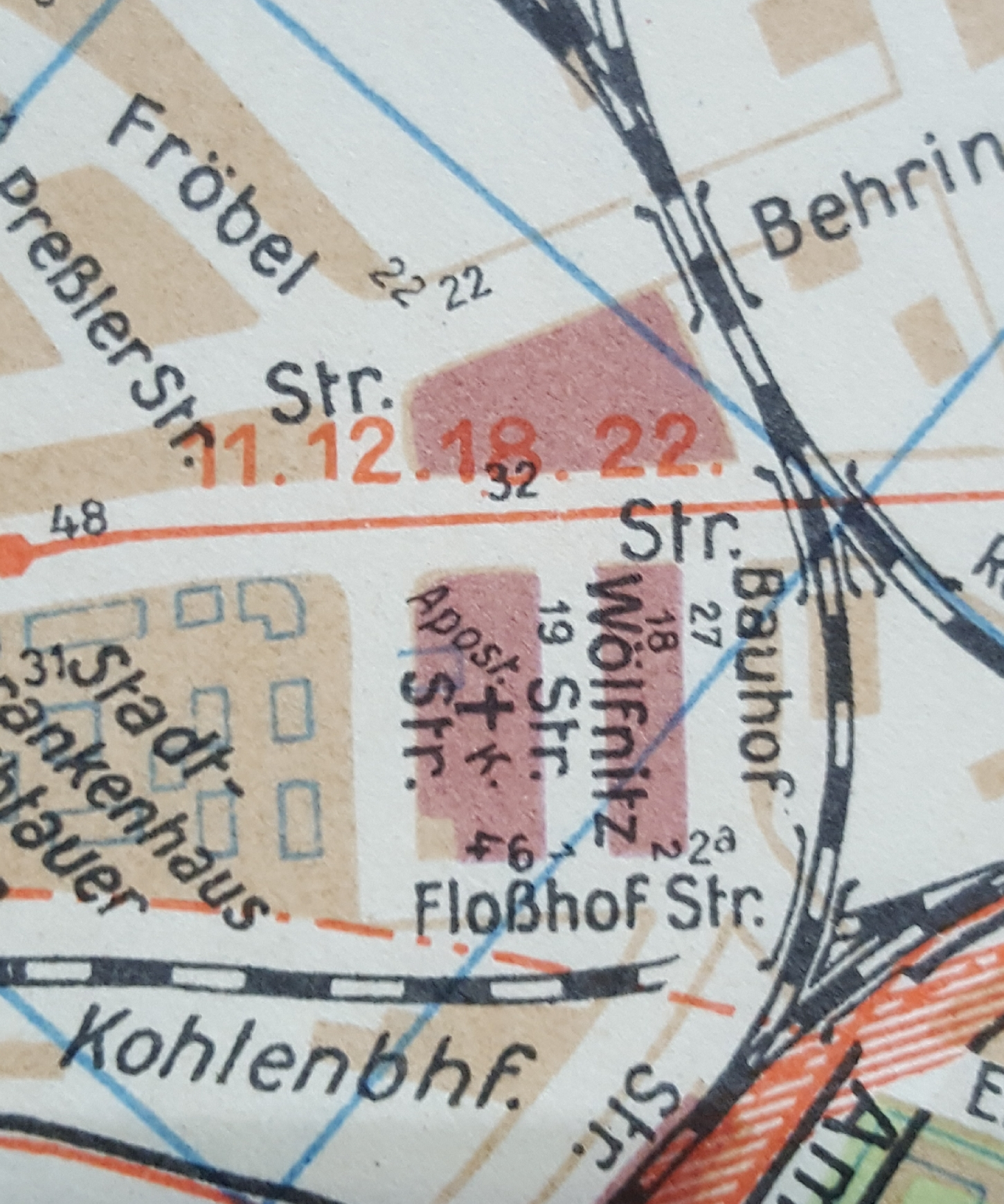 Friedrichstadt, Stadtplan Dresden von 1948. Katholische-apostolische Kirche